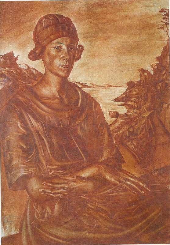 В. Шухаев. Портрет С.Н.Андронниковой. 1917г. Бумага, сангина, графитный карандаш. 90 х 65,2 см. ГРМ